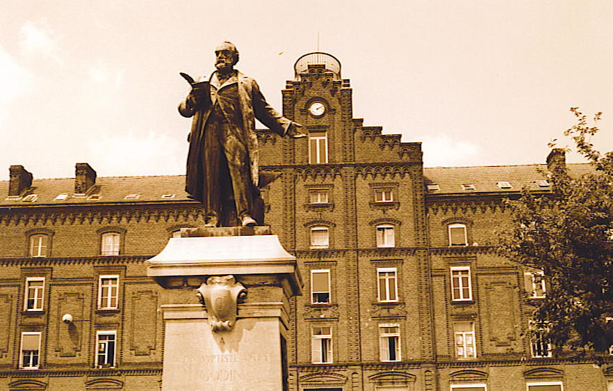 Standbeeld van Jean-Baptiste André Godin te Guise - eigen foto - april 2004